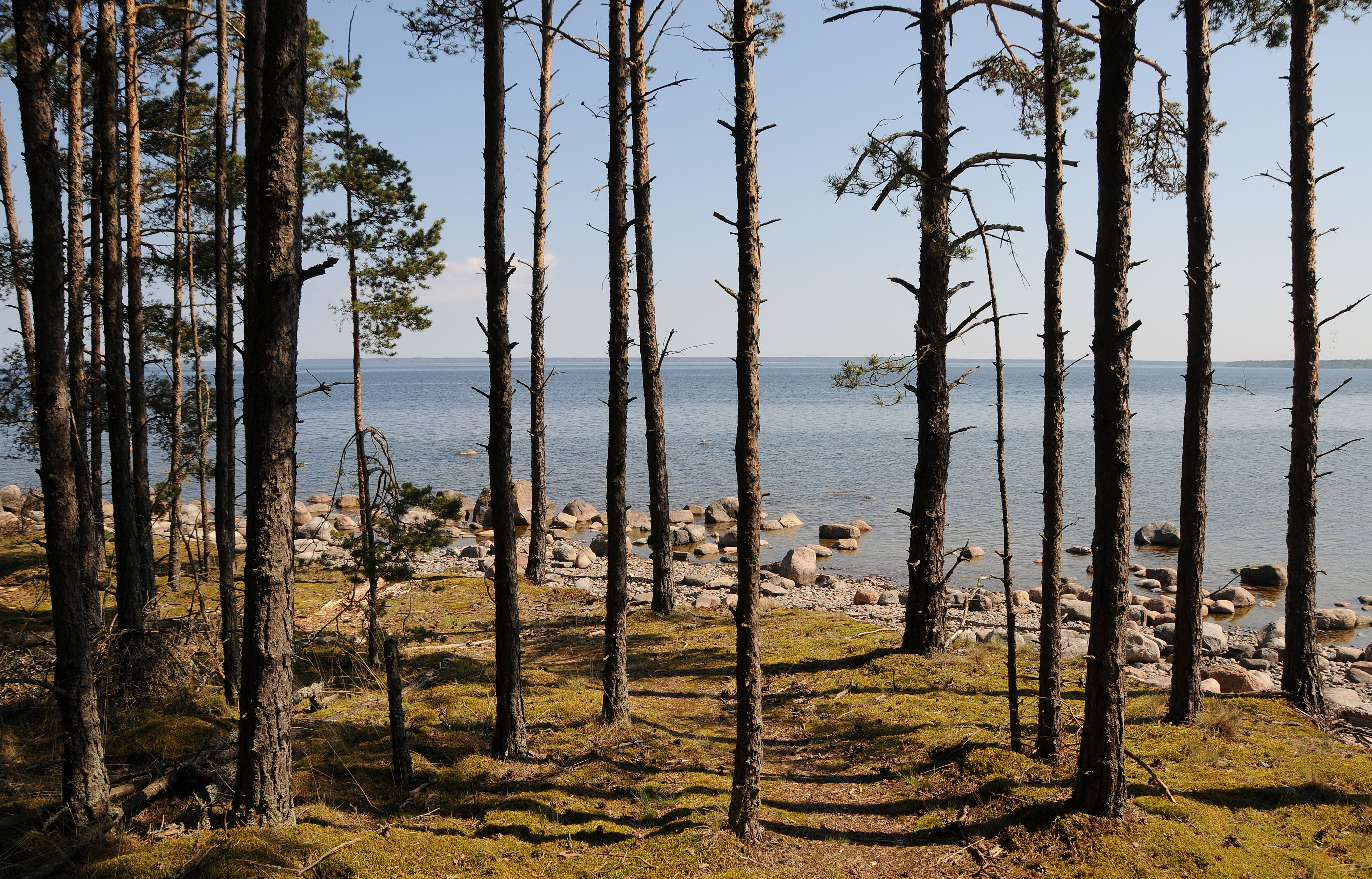 saare kirdeots